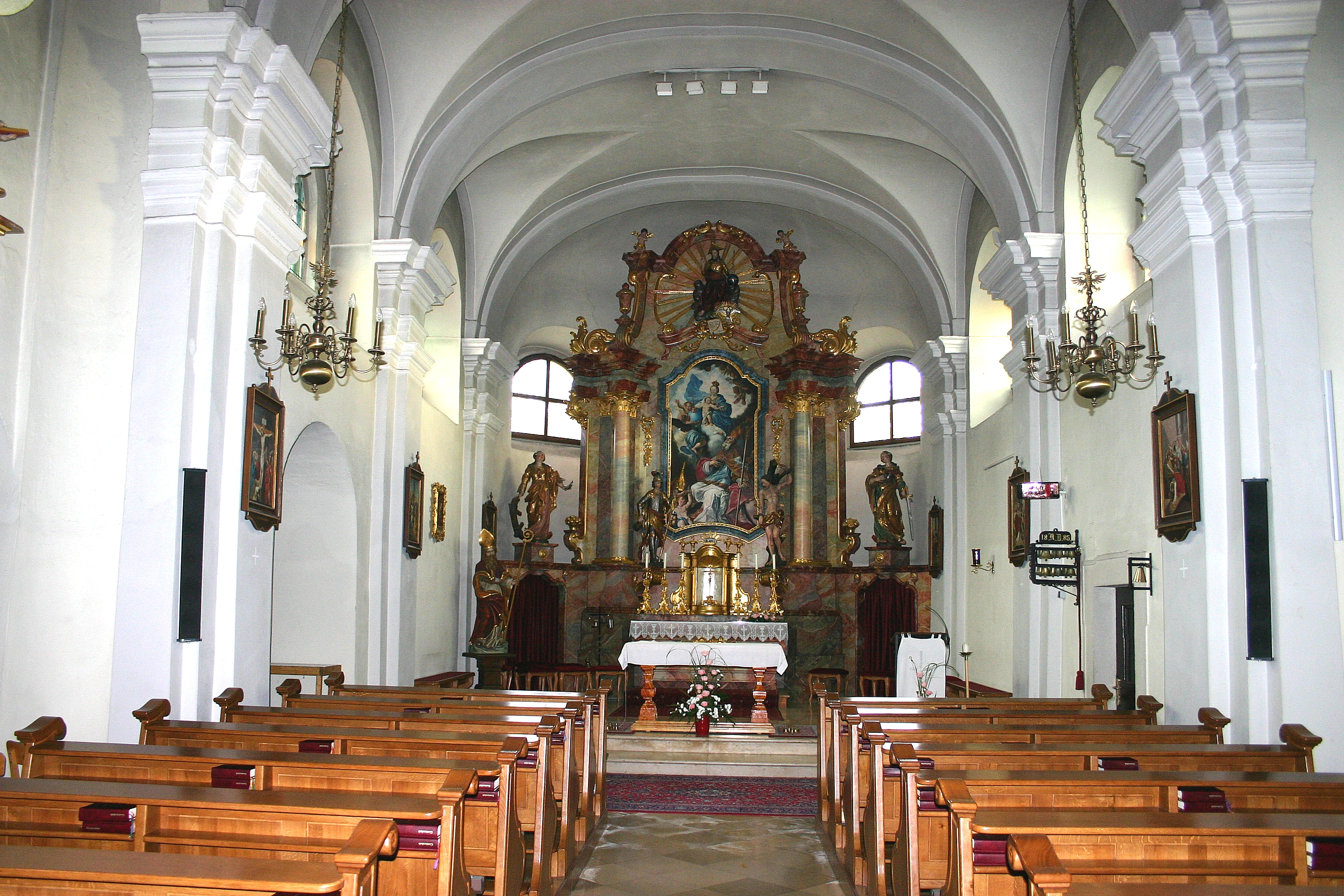 Pöttsching römisch-katholische Pfarrkirche Innenansicht